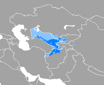 Idioma uzbeco Donde es mayoritario Donde es minoritario